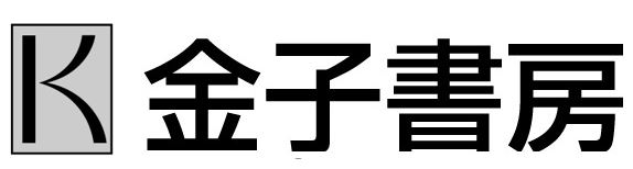 2019年現在のロゴマーク